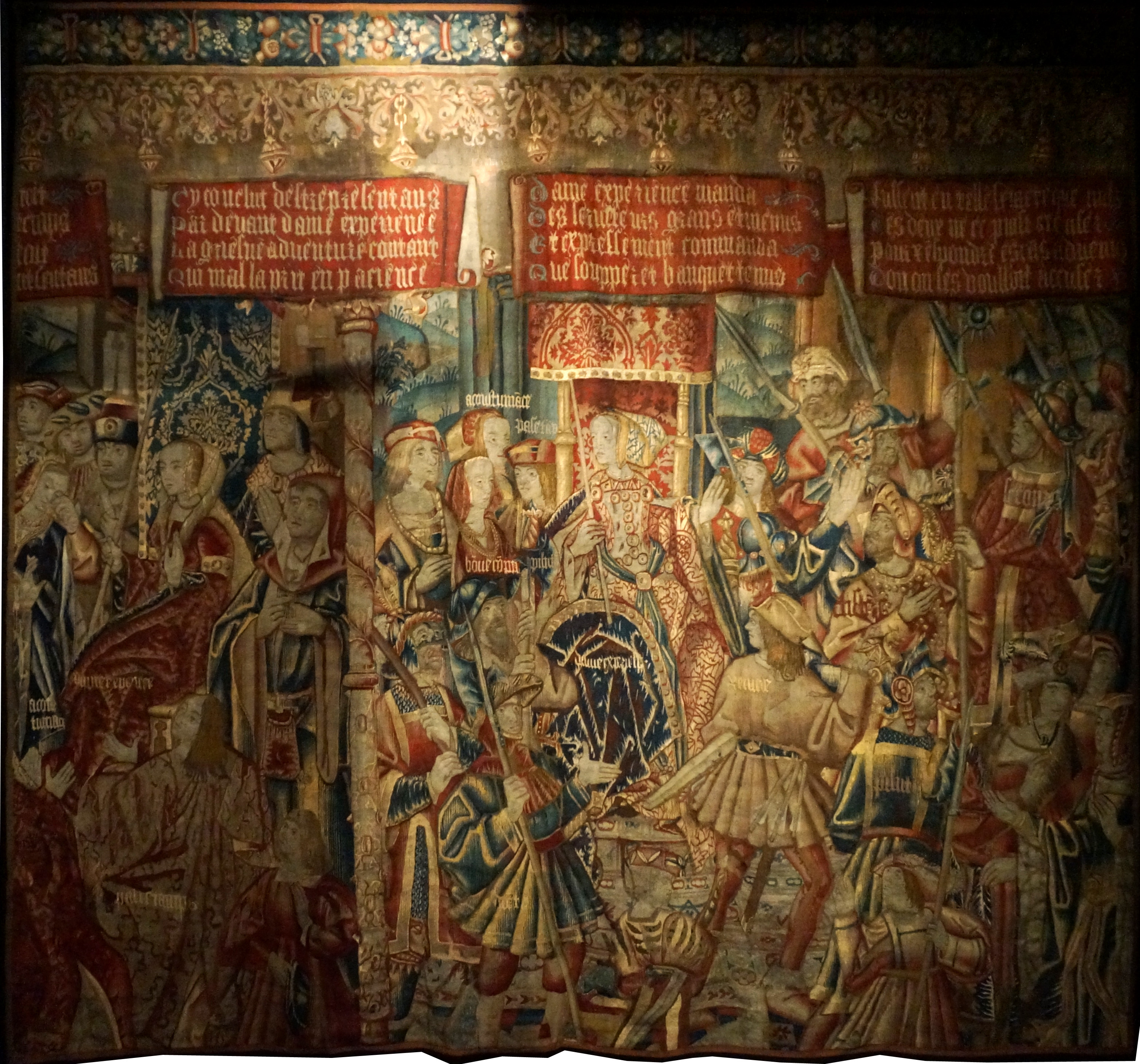 tapisserie de Tournais du XVIe siècle, Condamnation_de_Banquet .